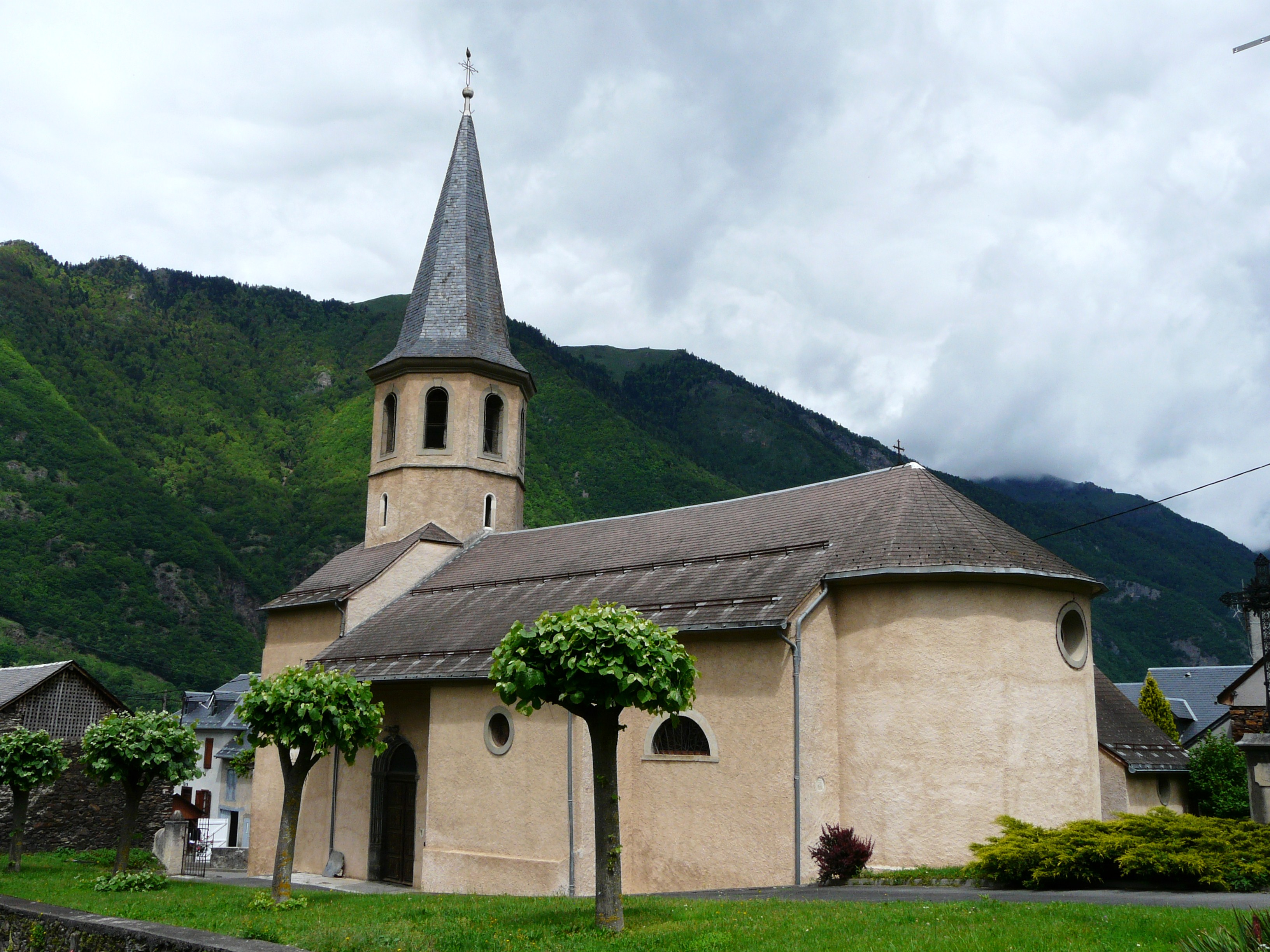 L'église de Juzet-de-Luchon, Haute-Garonne, France.